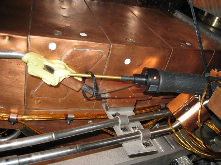 Nachweis der integralen Dichtheit mit dem Überdruckverfahren B3 der DIN EN 1779